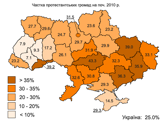 Частка протестантських громад на 2010 р.